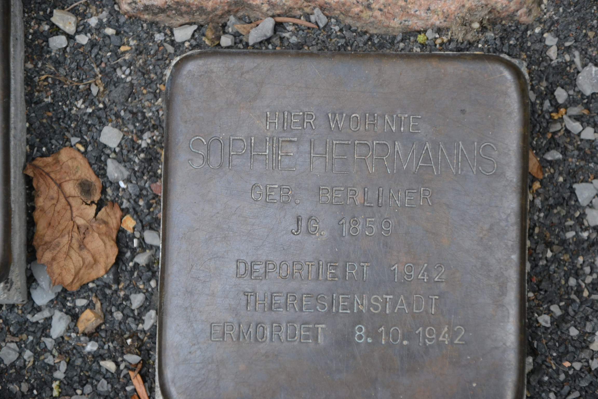 Stolperstein